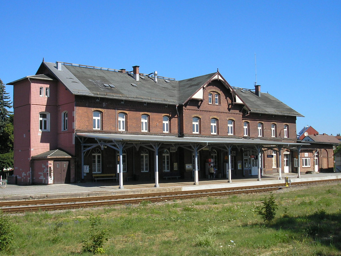 Der Ilmenauer Bahnhof, gleisseitig.